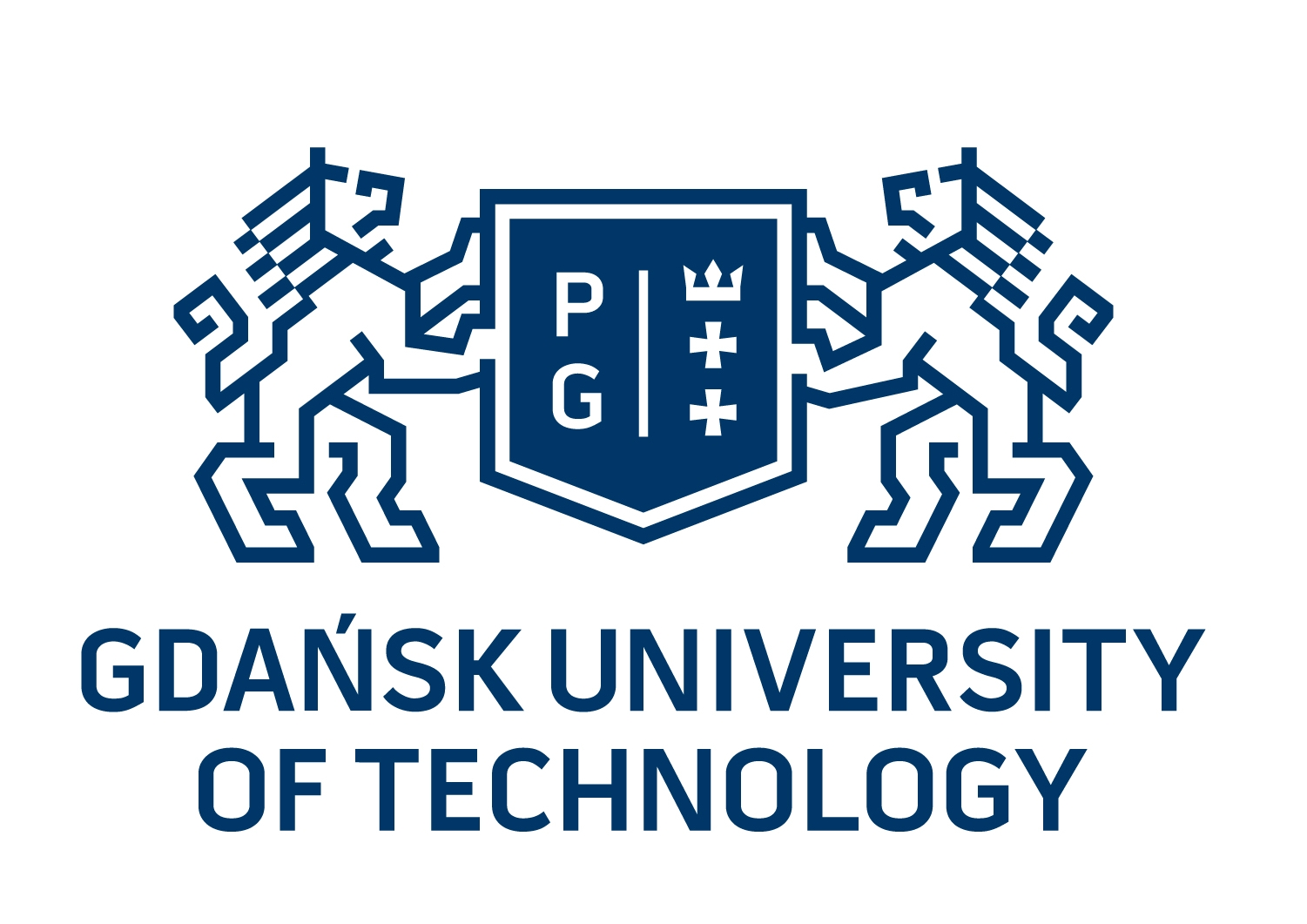 logo_pg_en